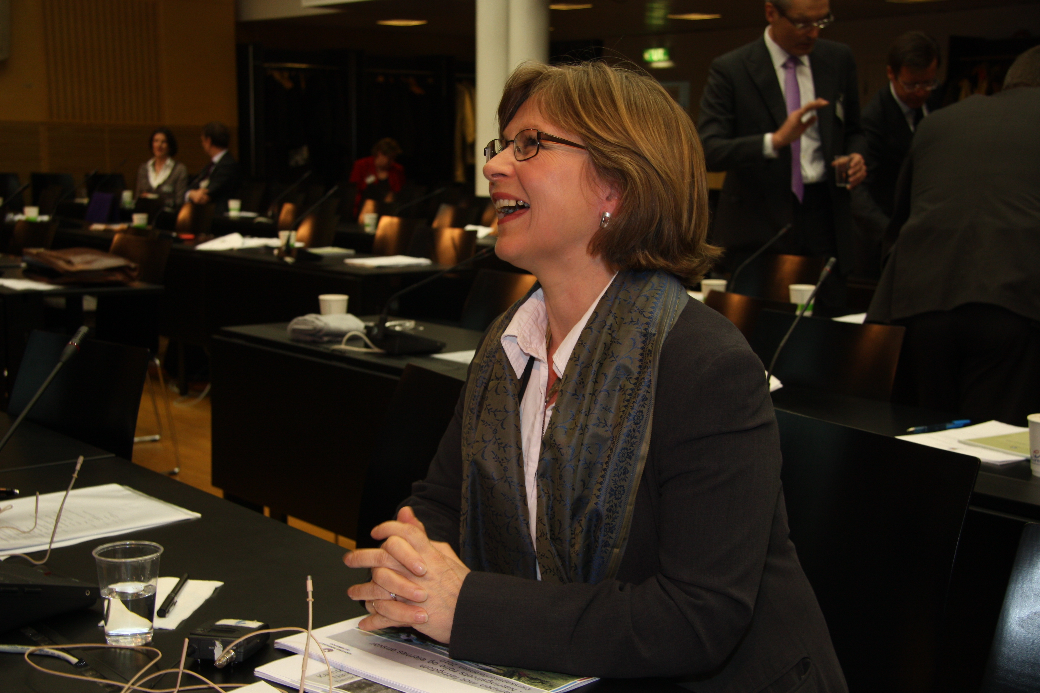 Anne Kristin Sydnes